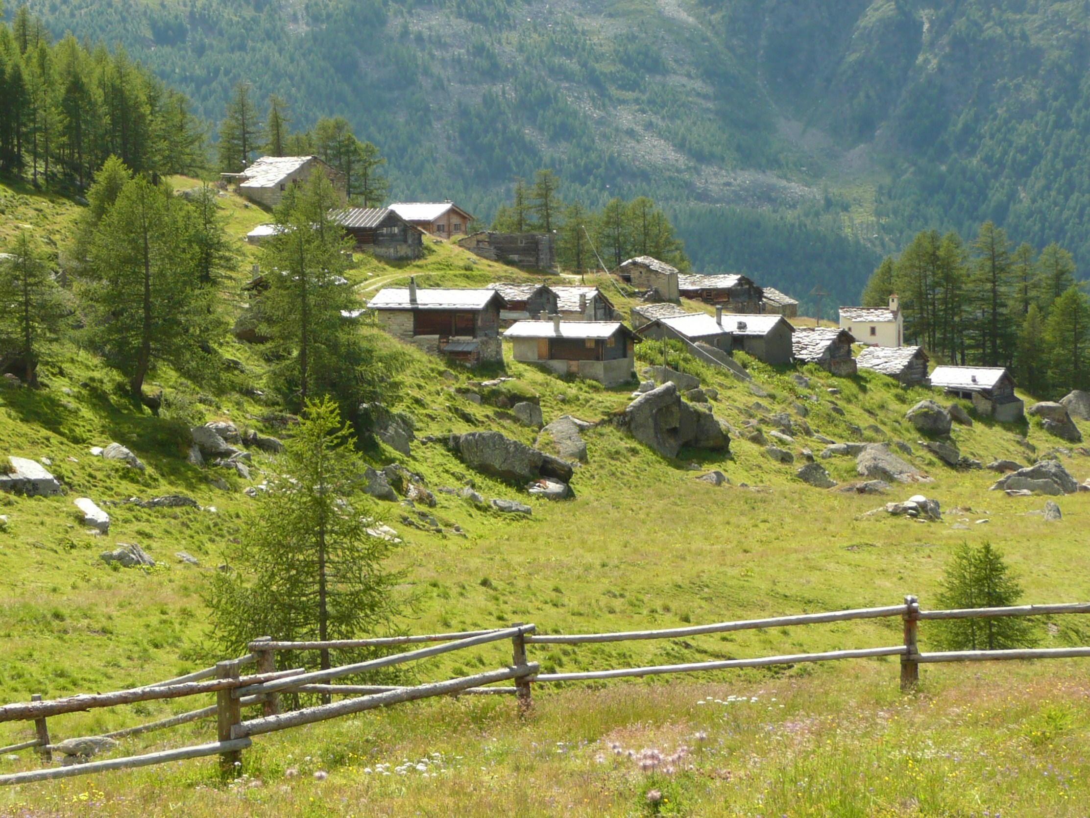 Triftalp oberhalb von Saas-Grund VS.